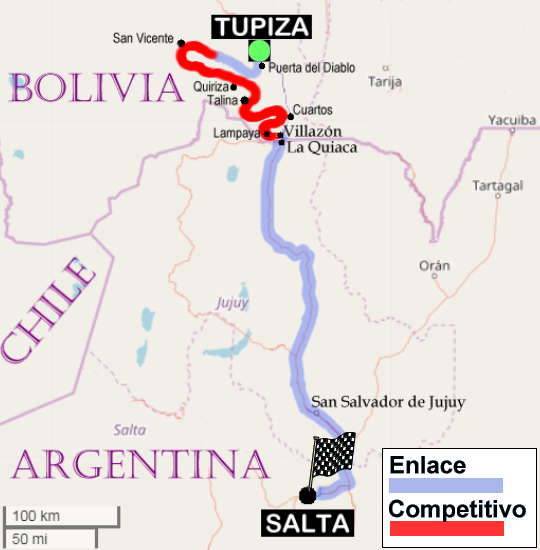 Dakar Rally 2018. Mapa de Etapa 9. Tupiza-Salta.